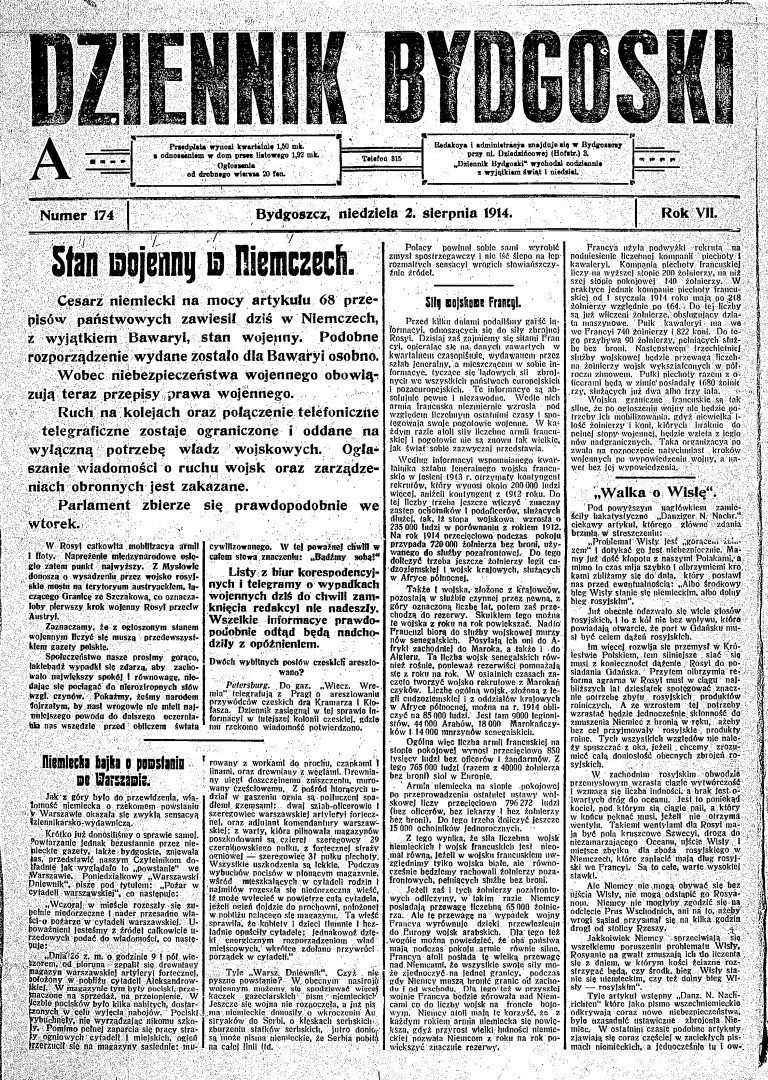 Dziennik Bydgoski, rok VII, nr 174, wiadomość o wybuchu I wojny światowej